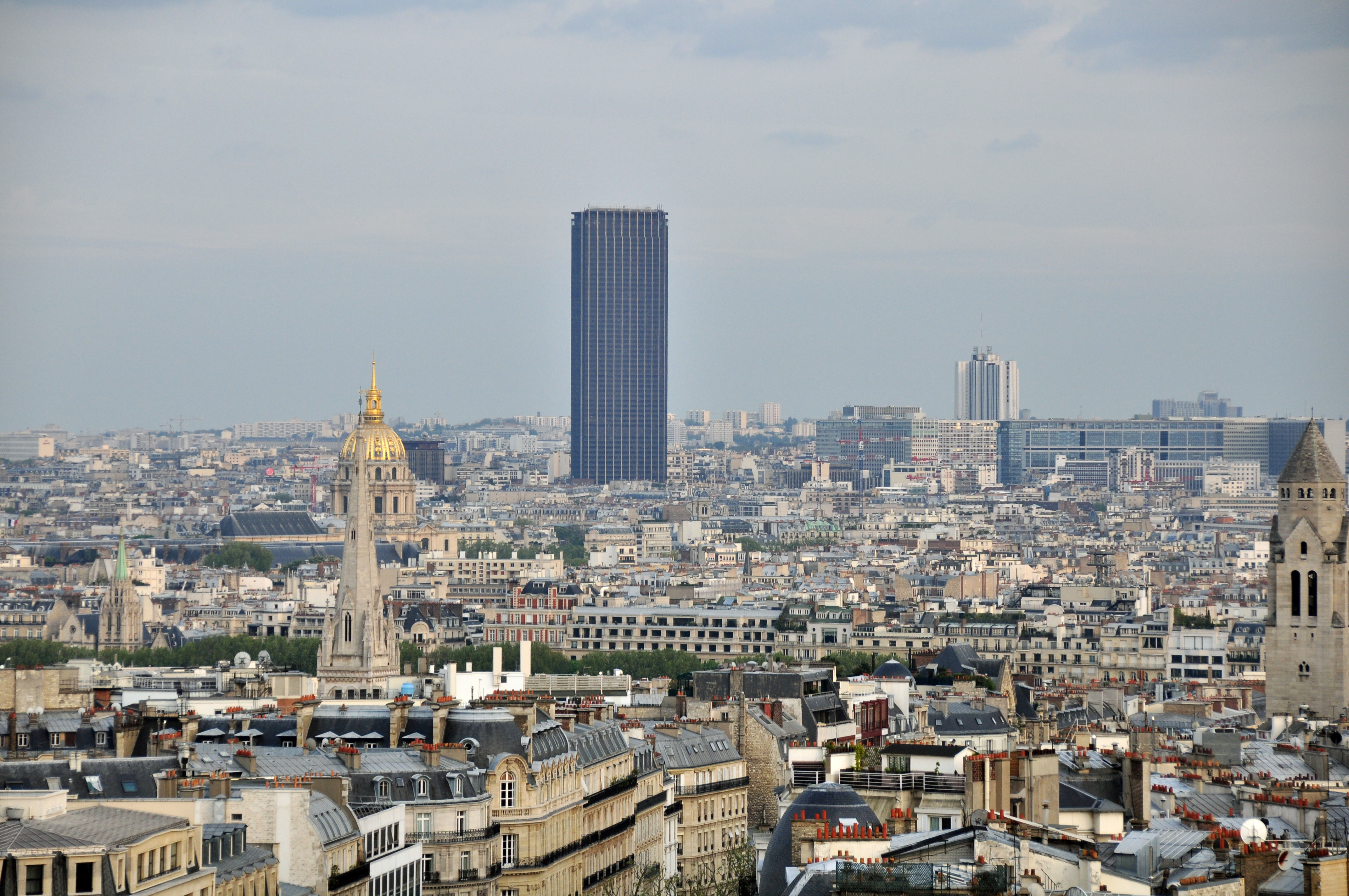 Франция